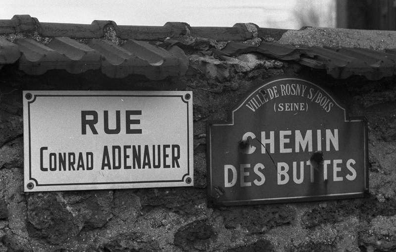 Einweihung der deutschen Botschaftsresidenz, Palais Beauharnais, in Paris. 14-22 "Rue Adenauer" in Rosny-sous-Bois.